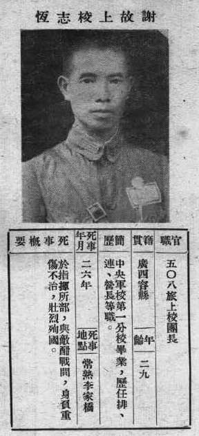 抗戰軍人忠烈錄第一輯中的烈士遺像